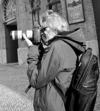 Fotógrafo e artista visual.